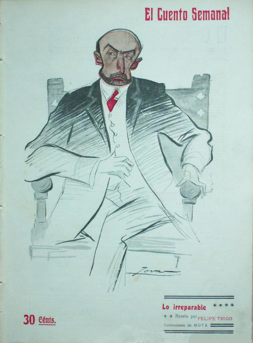 Portada de Santificarás las fiestas.